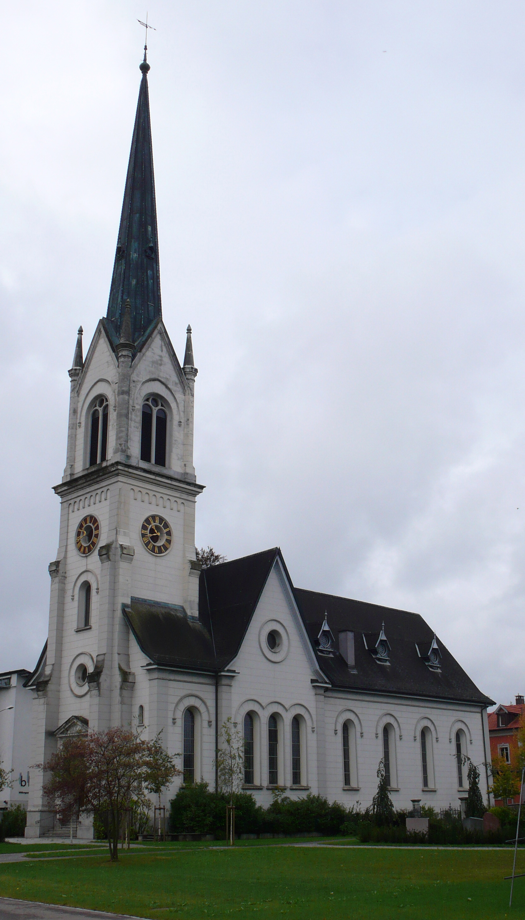 Evangelische Kirche Kreuzlingen (Engelshofen)